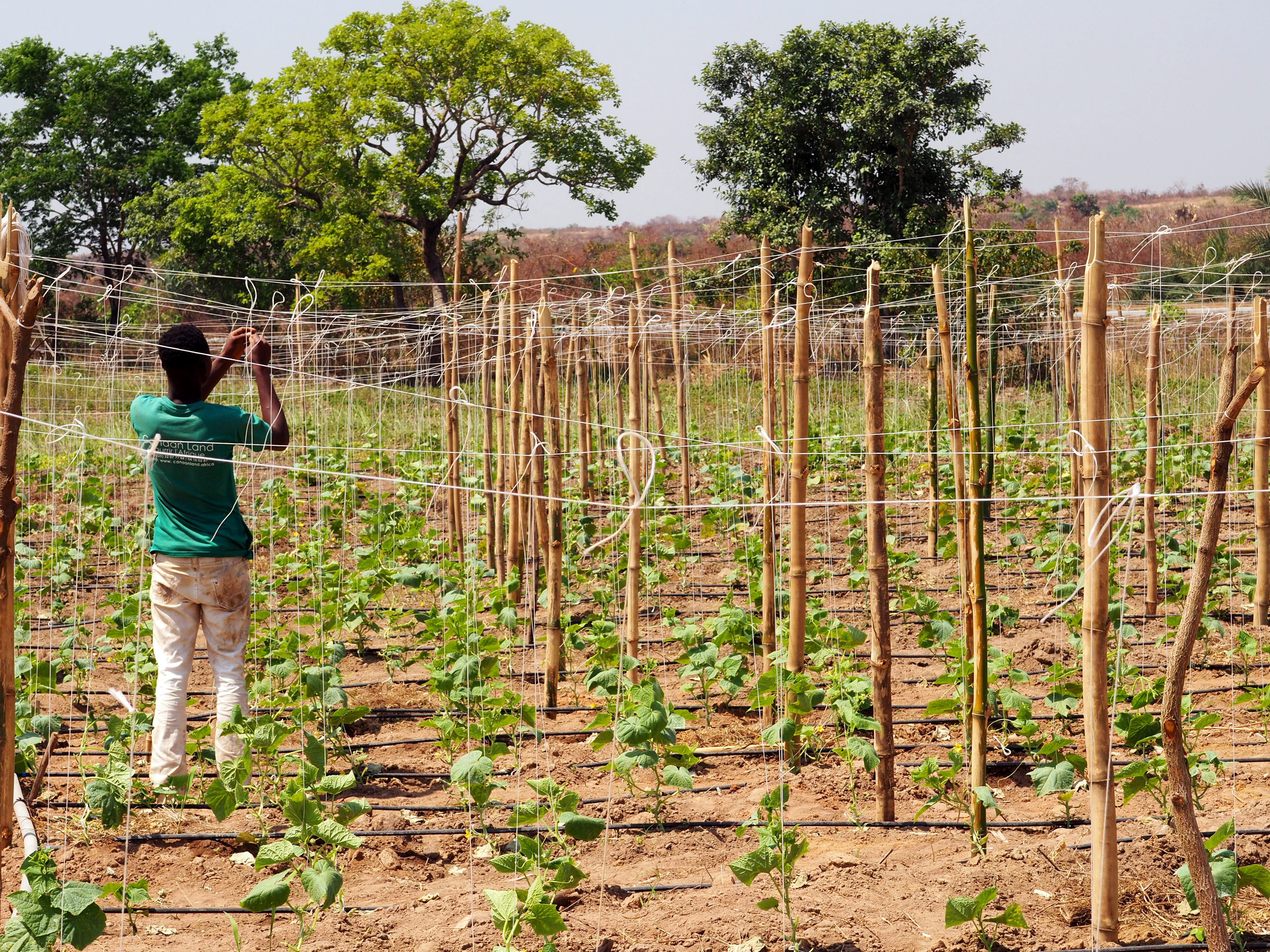 Production plein champ Canaan Land